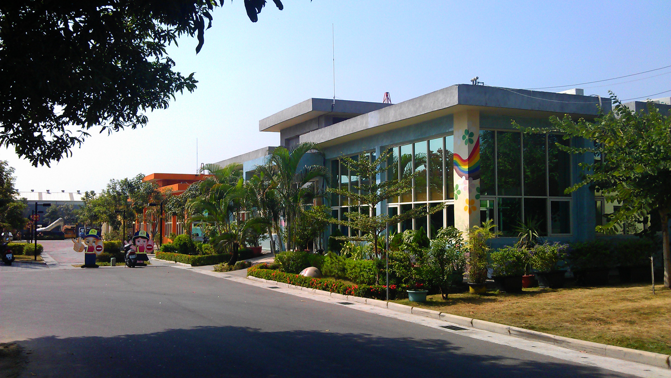 中文（台灣）: 台中市環保局清淨園區